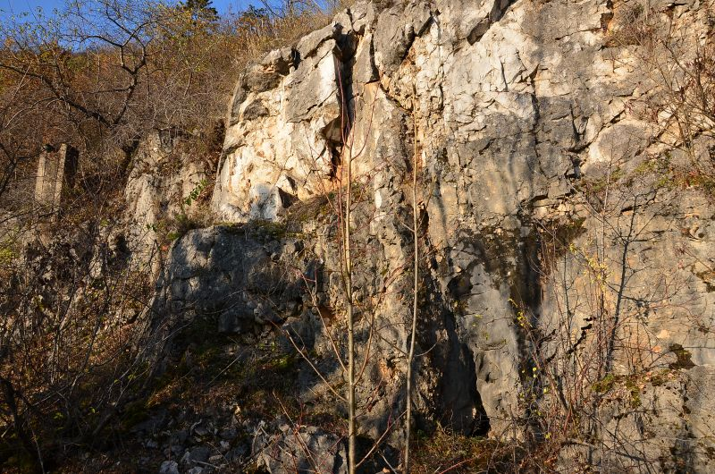 Umelý odkryv vo wettersteinskom vápenci v stráni planiny Horný vrch. Hornina je prestúpená puklinami, puklinovými systémami a krasovými kavernami. Vrchný horizont sa rozpadáva v dôsledku biomechanického vplyvu koreňových sústav drevín.